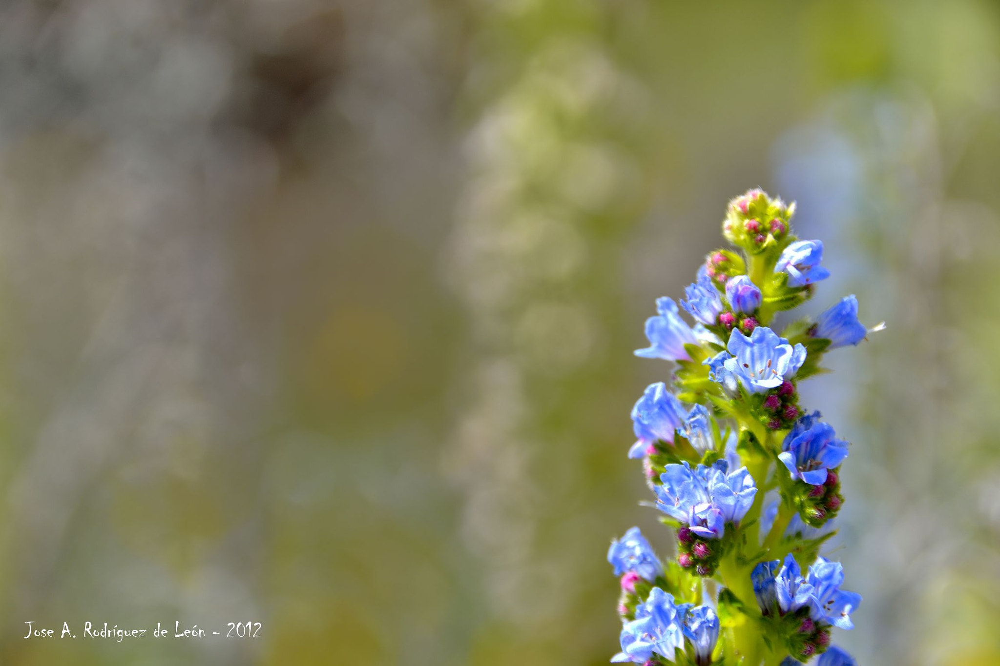 500px provided description: Conocido como tajinaste azul de Gran Canaria o de Tenteniguada (Echium callithyrsum), es una especie bot?nica de planta herb?cea perteneciente a la familia de las boragin?ceas Es una planta arbustiva ramificada que puede alcanzar 3,5 m de altura. Se desarrolla en zonas h?medas del norte y noreste de Gran Canaria, entre 450 y 1500 msnm, a pleno sol, tolerando bien la sombra. Su mayor y m?s conocida poblaci?n se encuentra en Tenteniguada (27?58'26" N; 15?31'45.26" O, comienzo del sendero que va desde Tenteniguada a la Caldera de Los Marteles).